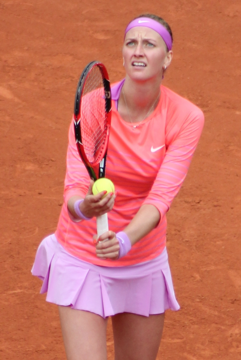 Kvitova RG15 (14)